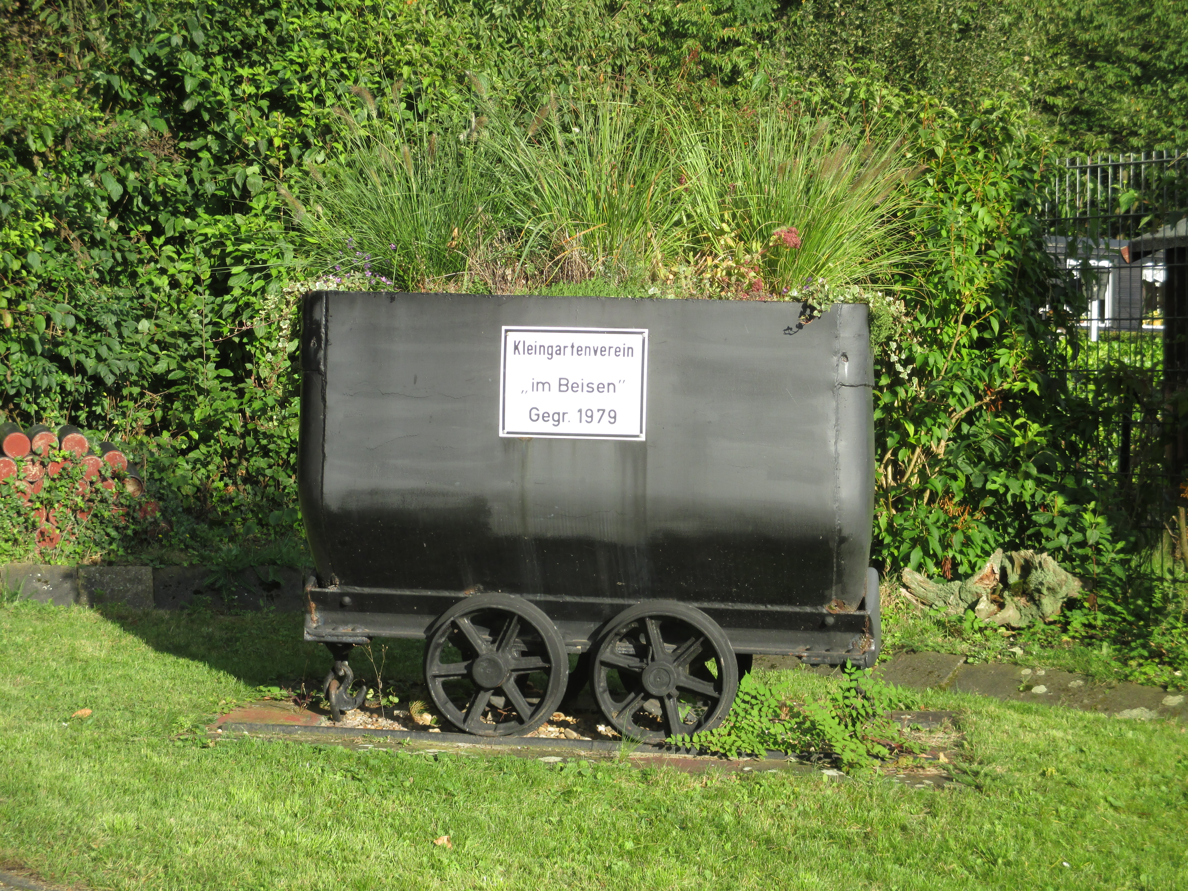 Bepflanzter Grubenwagen im Kleingartenverein "Im Beisen" ("Golanhöhen").